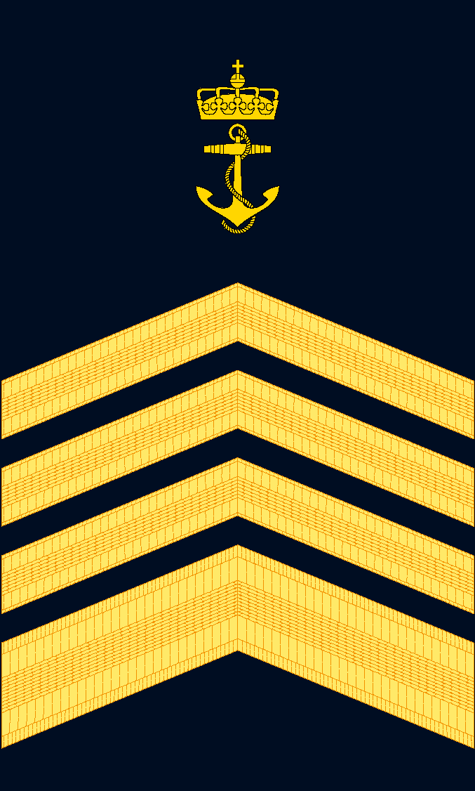 Or9